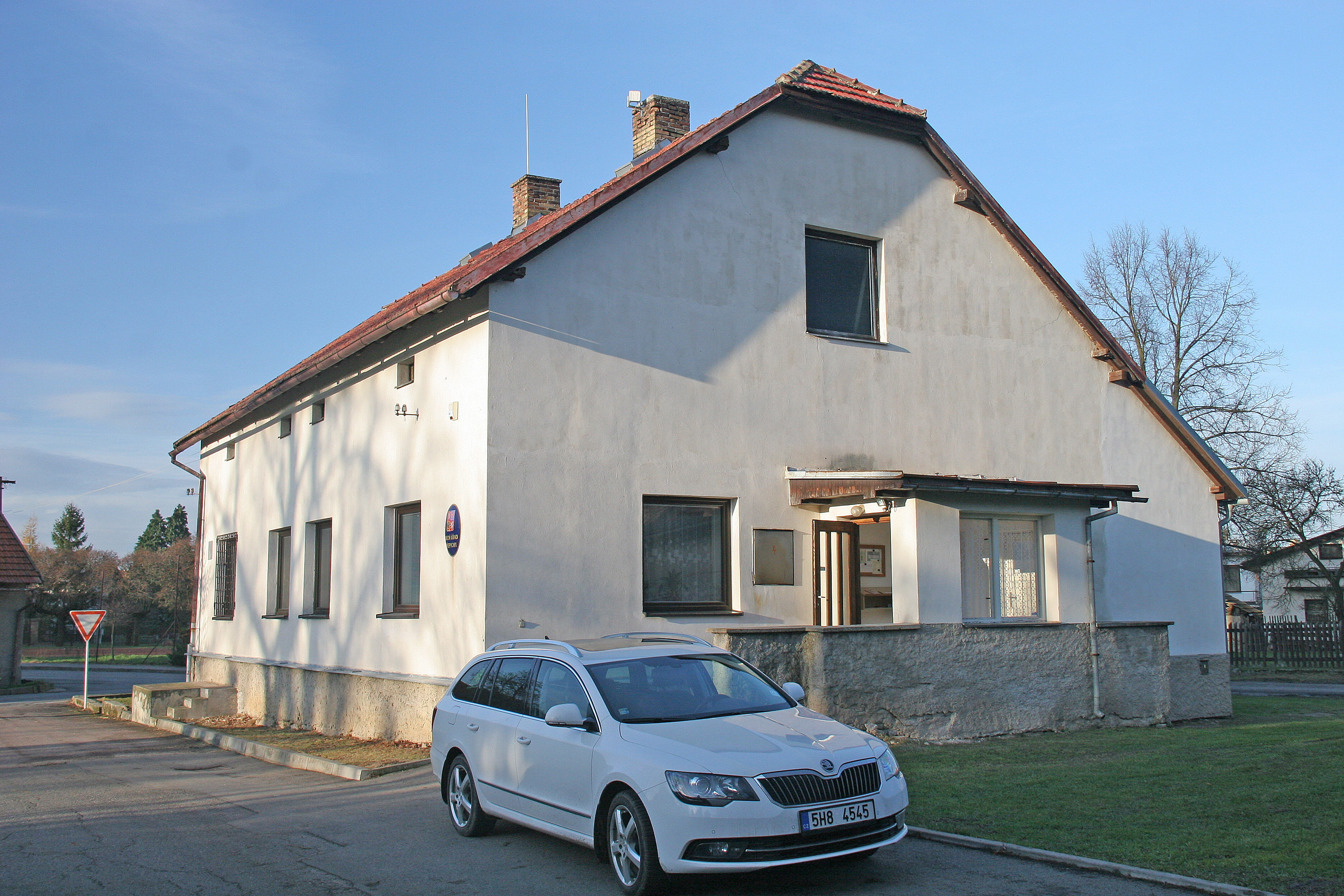 Přepychy - obecní úřad